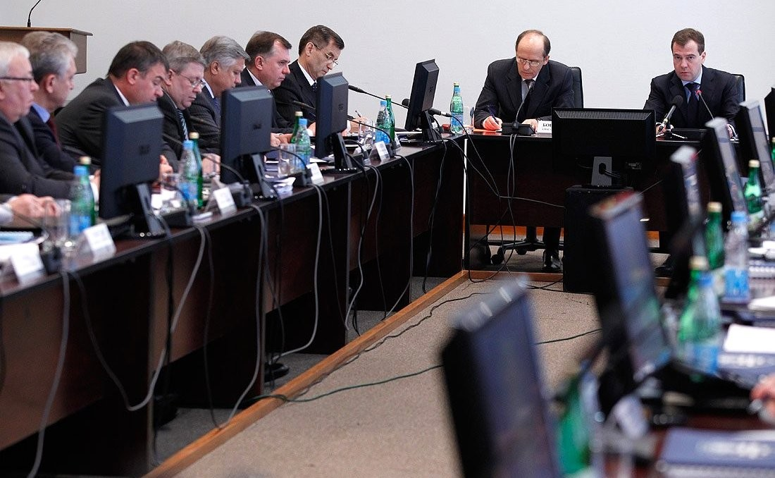 Заседание Национального Антитеррористического Комитета (2011)